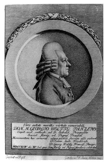 Georg Wolfgang Panzer im Profil nach rechts. Literatur: Literatur: Mortzfeld A 15726, Panzer 1. Forts. 34 (19), Drugulin 15572, Singer 70106, Diepenbroick 18917